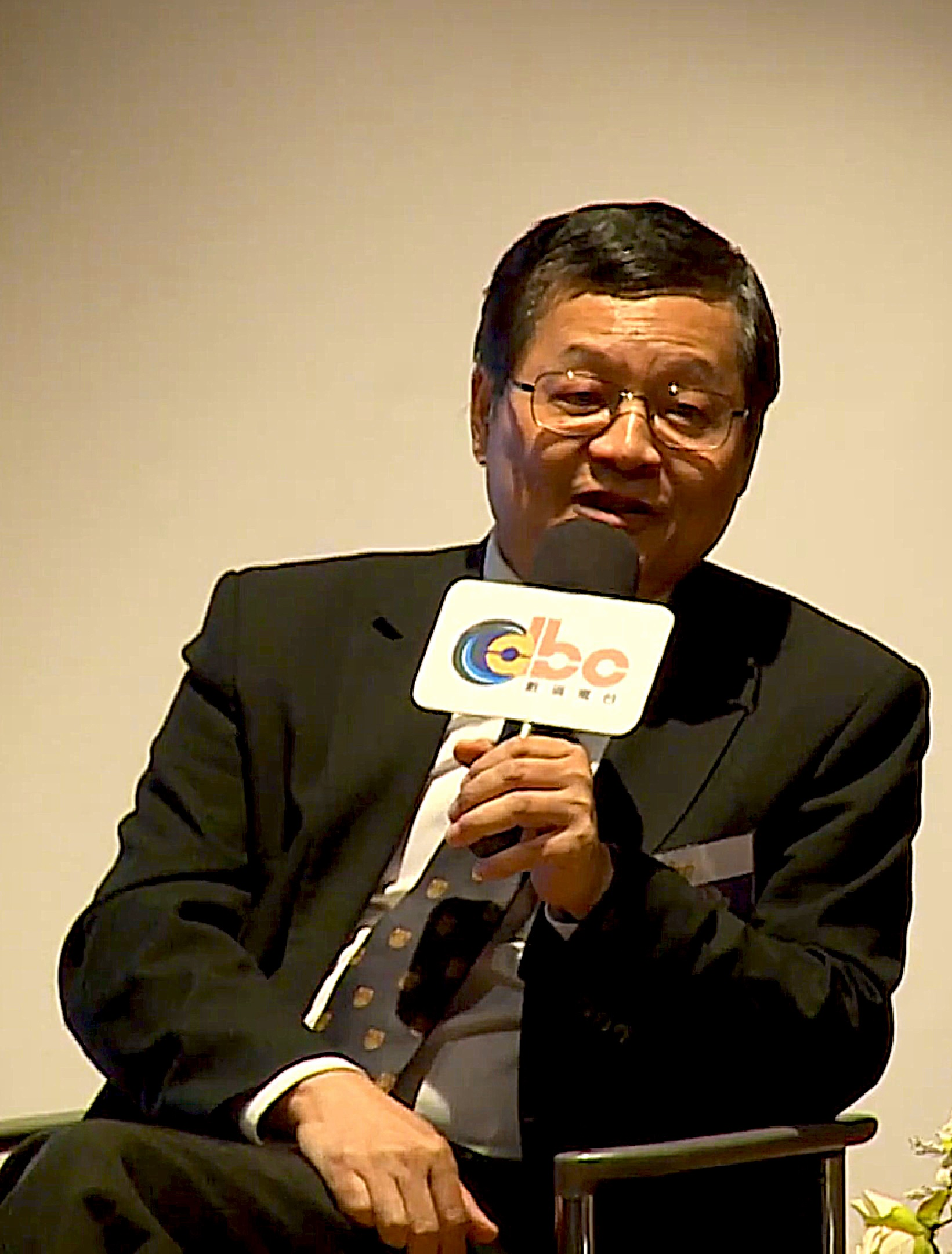 中文（香港）: 香港教育家及歷史學家，2004至2014年曾任崇基學院院長